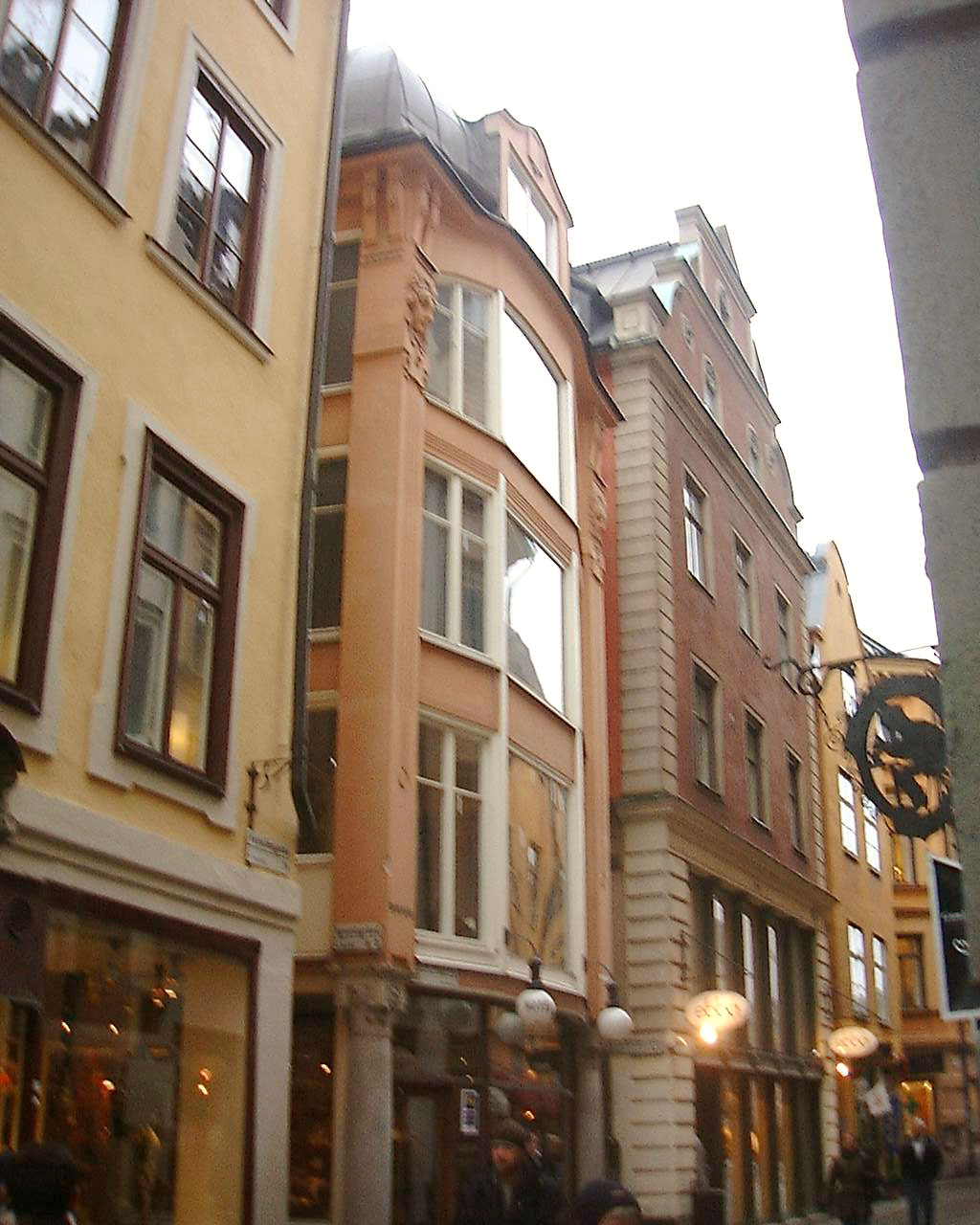 Västerlånggatan, Gamla stan, Stockholm